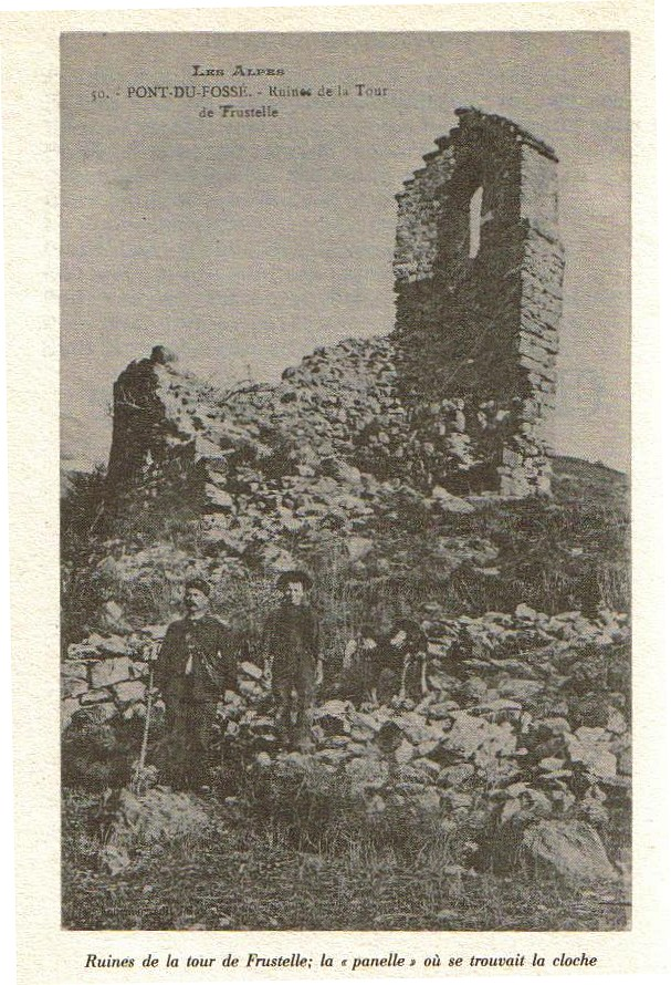 La "panelle" de Frustelle, sur la colline de Montorcier, dont la cloche fit l'objet d'un vol, mis en poème par Jean Faure du Serre. Aujourd'hui disparue. La photo date des années 1890.